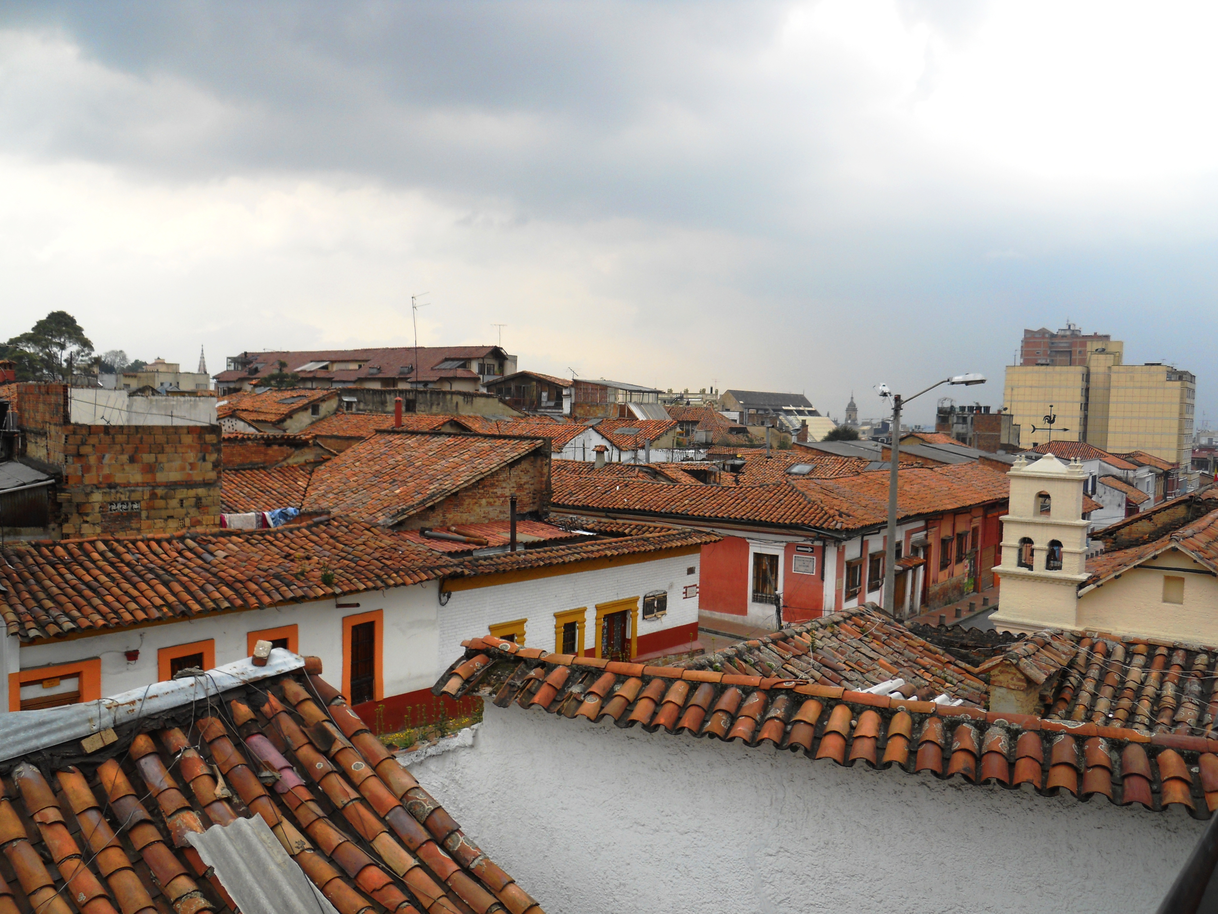 Techos de La Candelaria desde el Chorro de Quevedo.